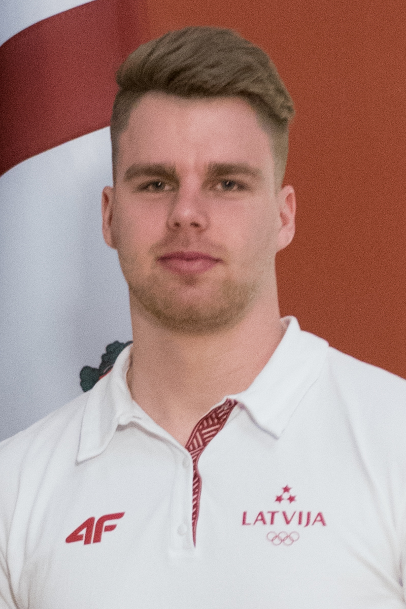 2018.gada 7.maijs. Svinīgais pasākums par godu Latvijas olimpiskās komandas “Phjončhana 2018” un Latvijas paralimpiešu augstajiem sasniegumiem un Latvijas vārda nešanu pasaulē. Foto: Ieva Ābele, Saeima Izmantošanas noteikumi: saeima.lv/lv/autortiesibas